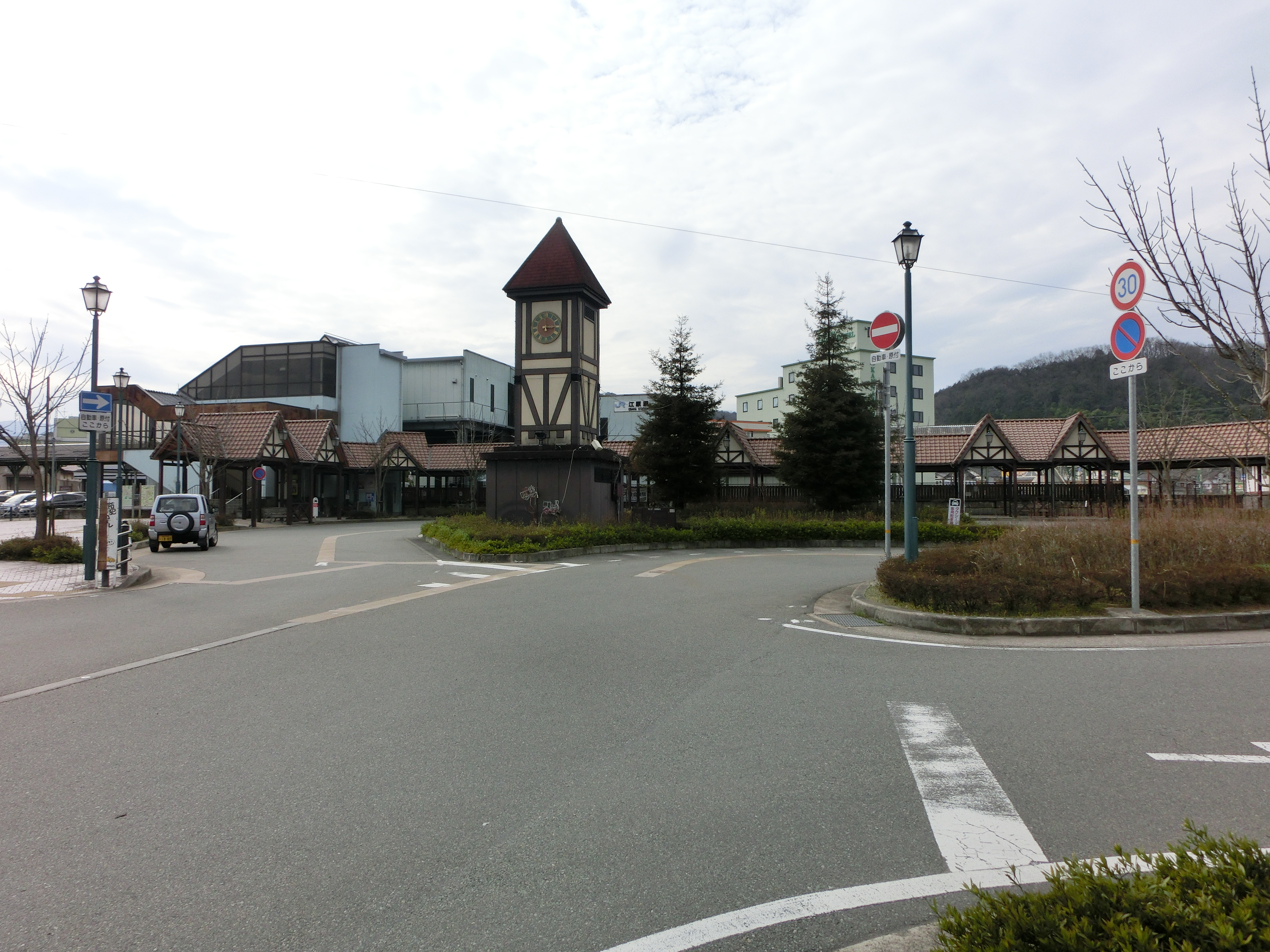 山陰本線、江原駅東口の画像。